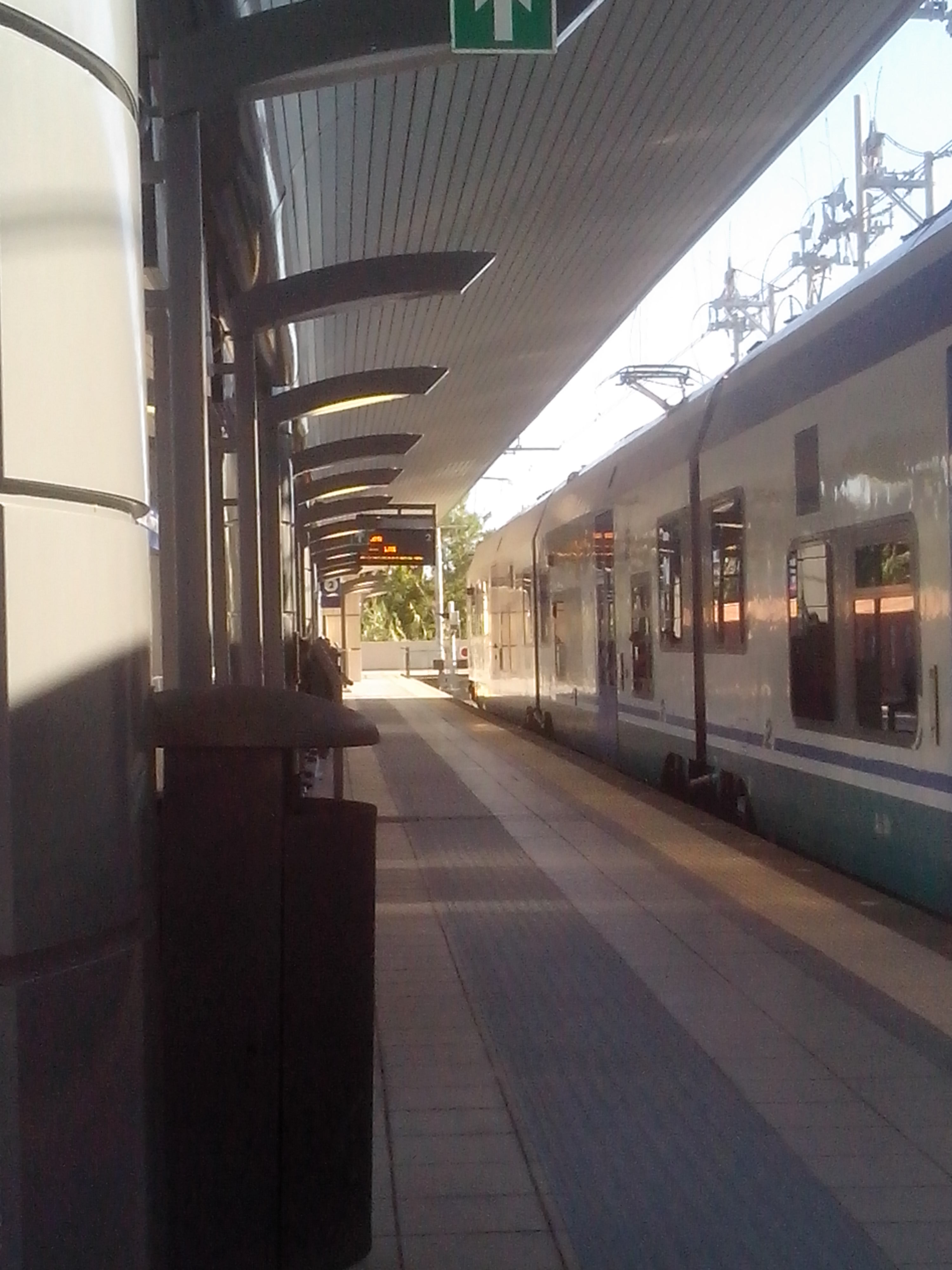 Binario 1 della stazione ferroviaria di Arechi, a Salerno.